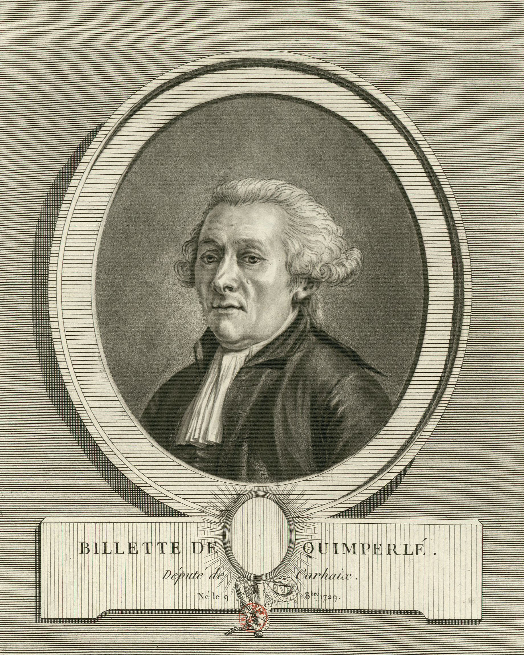 Vincent Samuel Billette de Villeroche, député du tiers-état, sénéchaussée de Carhaix, aux États généraux et à l'Assemblée constituante